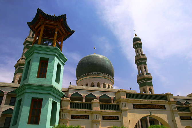 Dongguan mosque, Xining, Qinghai, China